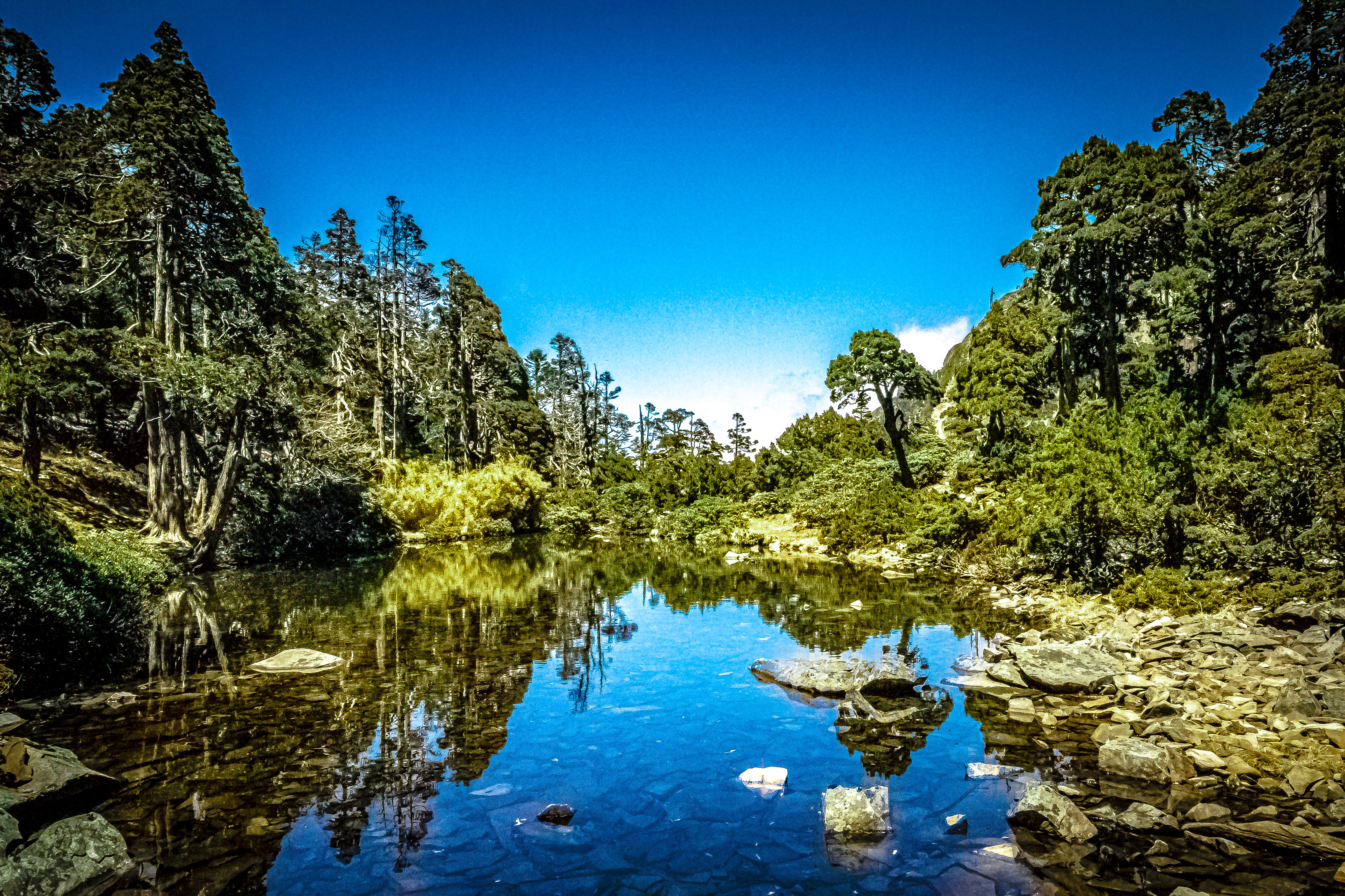 中文（台灣）: 翠池位於7號圈谷，不僅是全台，更是東南亞最高的高山湖泊，同時也是大安溪的源頭。